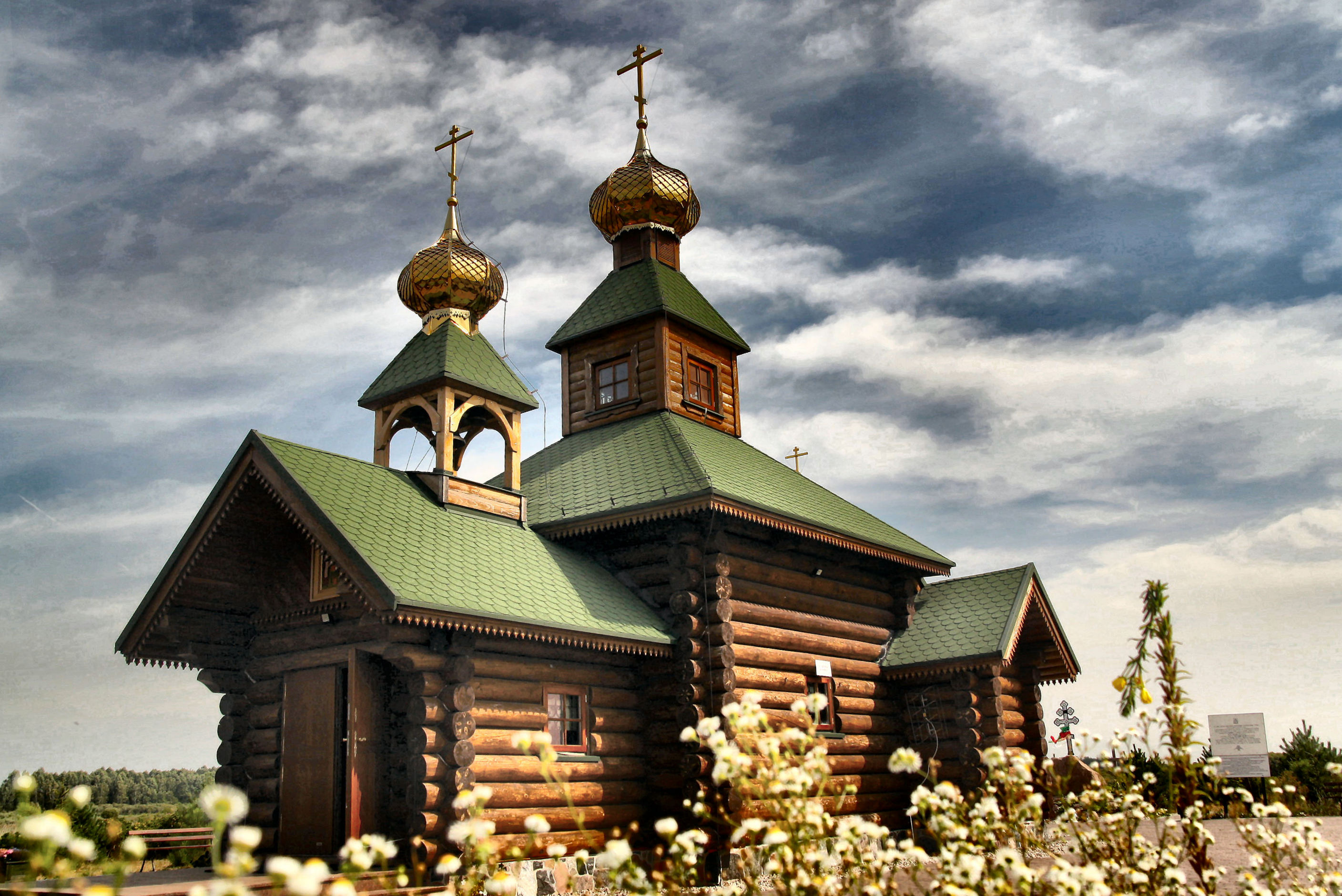 Cerkiew Opieki Matki Bożej na terenie skitu Świętych Antoniego i Teodozjusza Pieczerskich w Odrynkach.